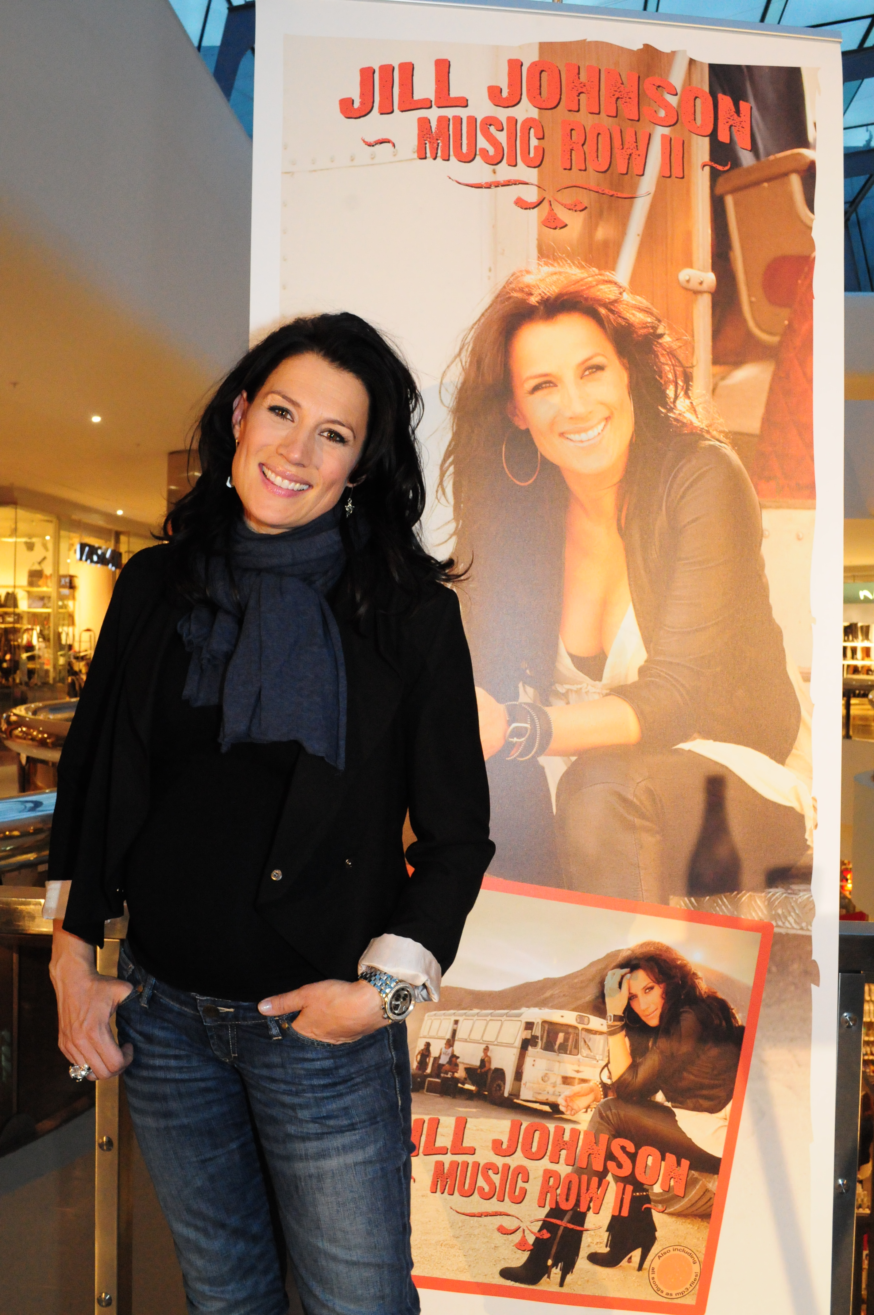 Jill Johnson besöker Linden Köpcentrum I Norrköping 2009